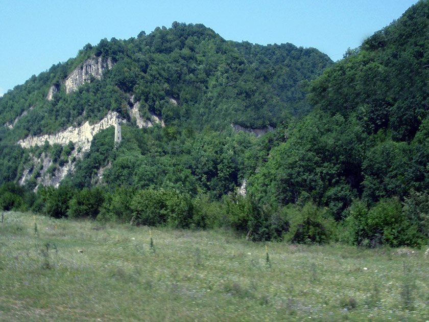 Башня находится прямо у въезде в Шатой, но на другом берегу реки Аргун